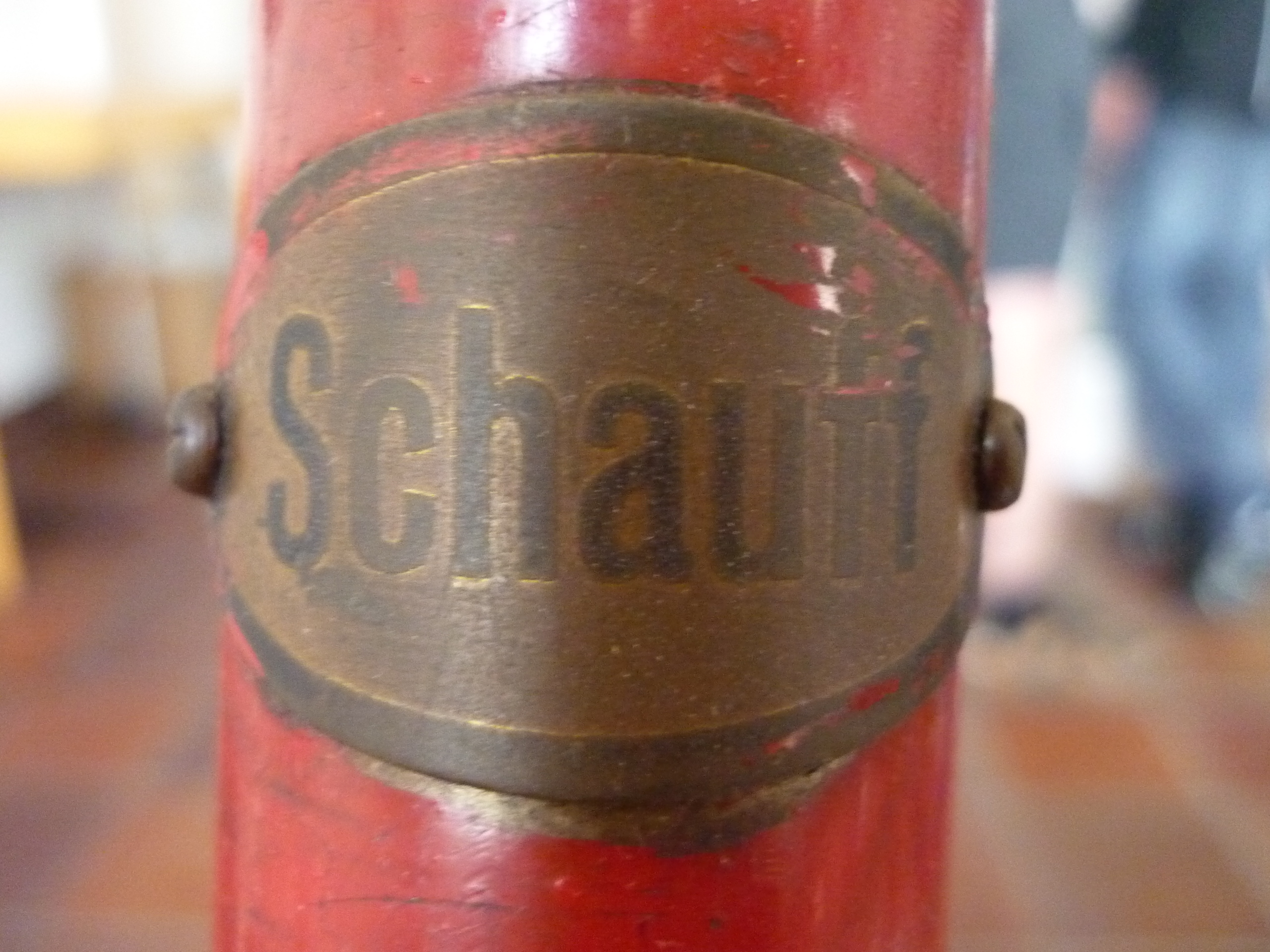 Head badge, Schauff